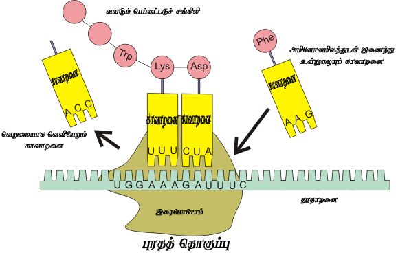 புரதத் தொகுப்பின் போது, காவாறனையும் தூதாறனையும் இடைத்தாக்கமுறல்